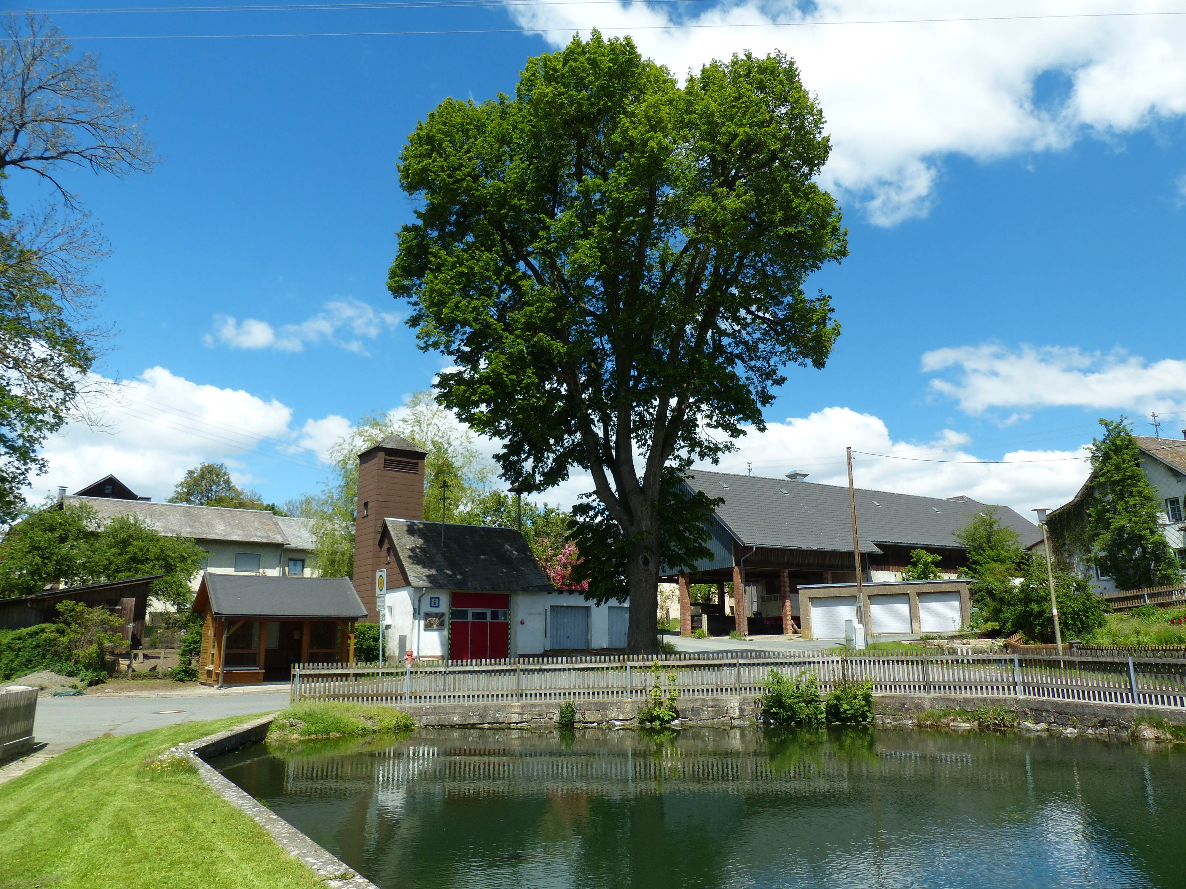 Naturdenkmal Friedenslinde Solg